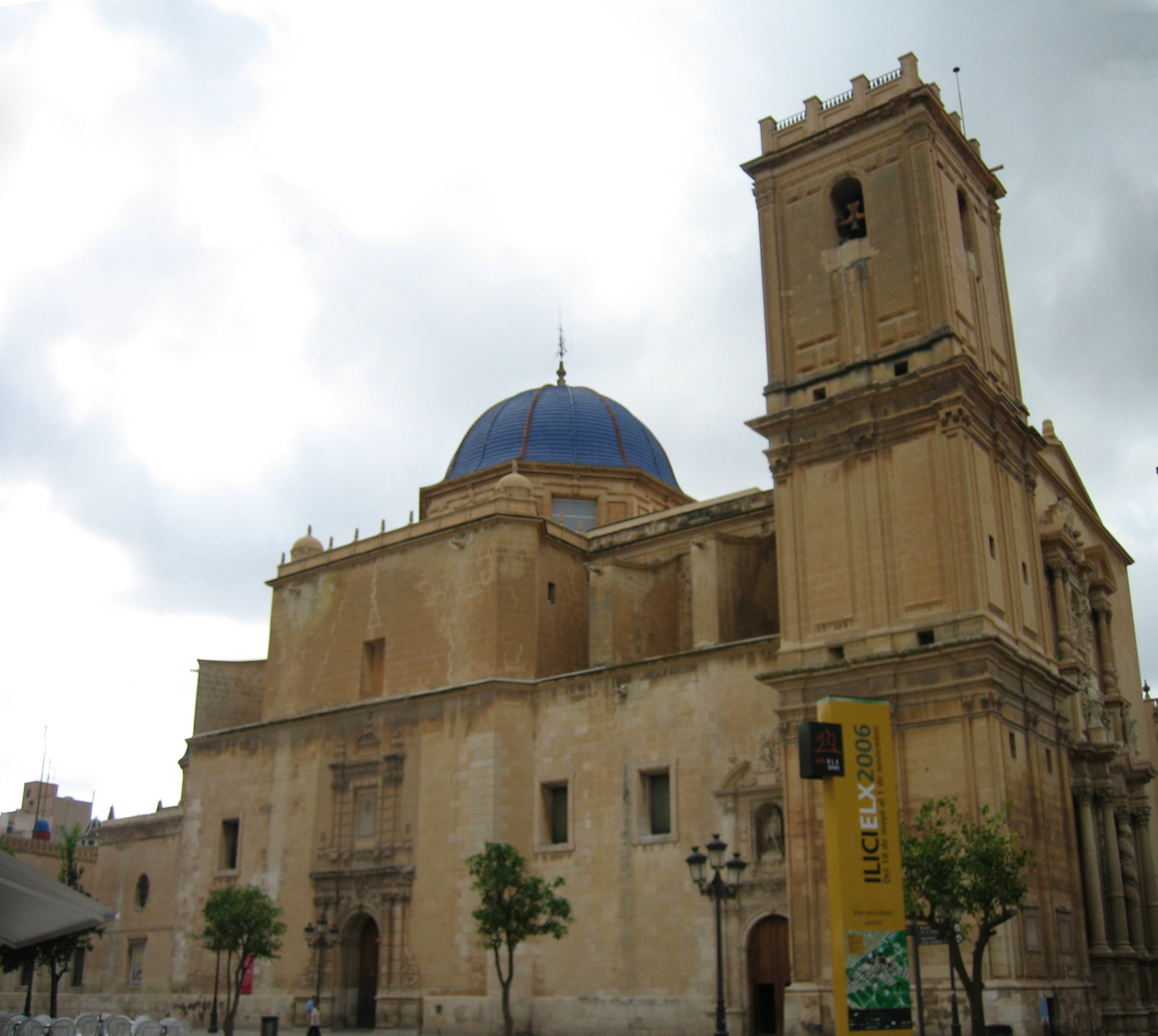 Basílica menor de Santa María de Elche, Alicante, España.